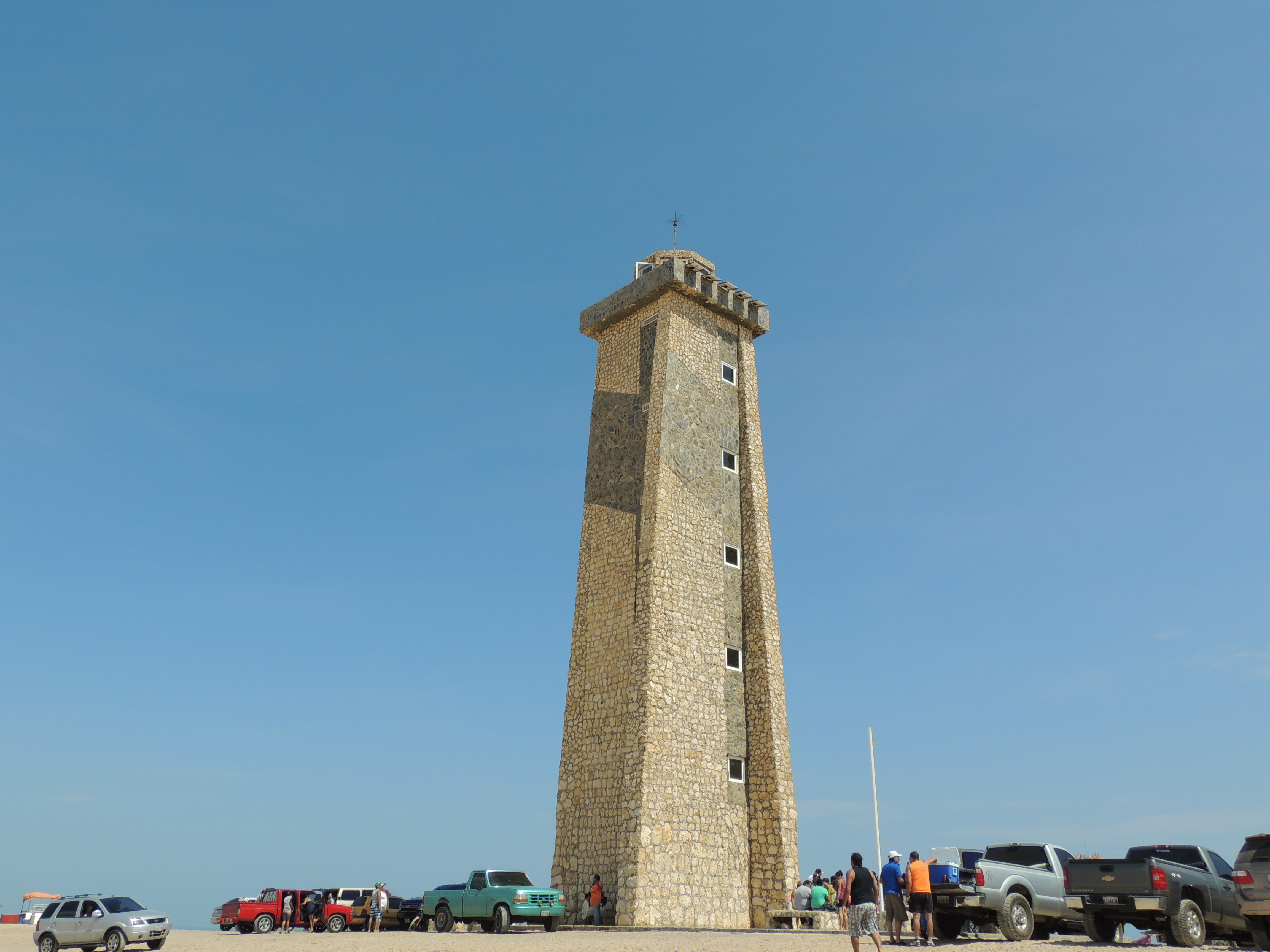 Cabo San Román, Paraguana, Edo. Falcon